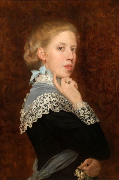 Ransonnet-Villez Eliza (Nemes Nándorné): Önarckép (Firenze, Uffizi Képtár)